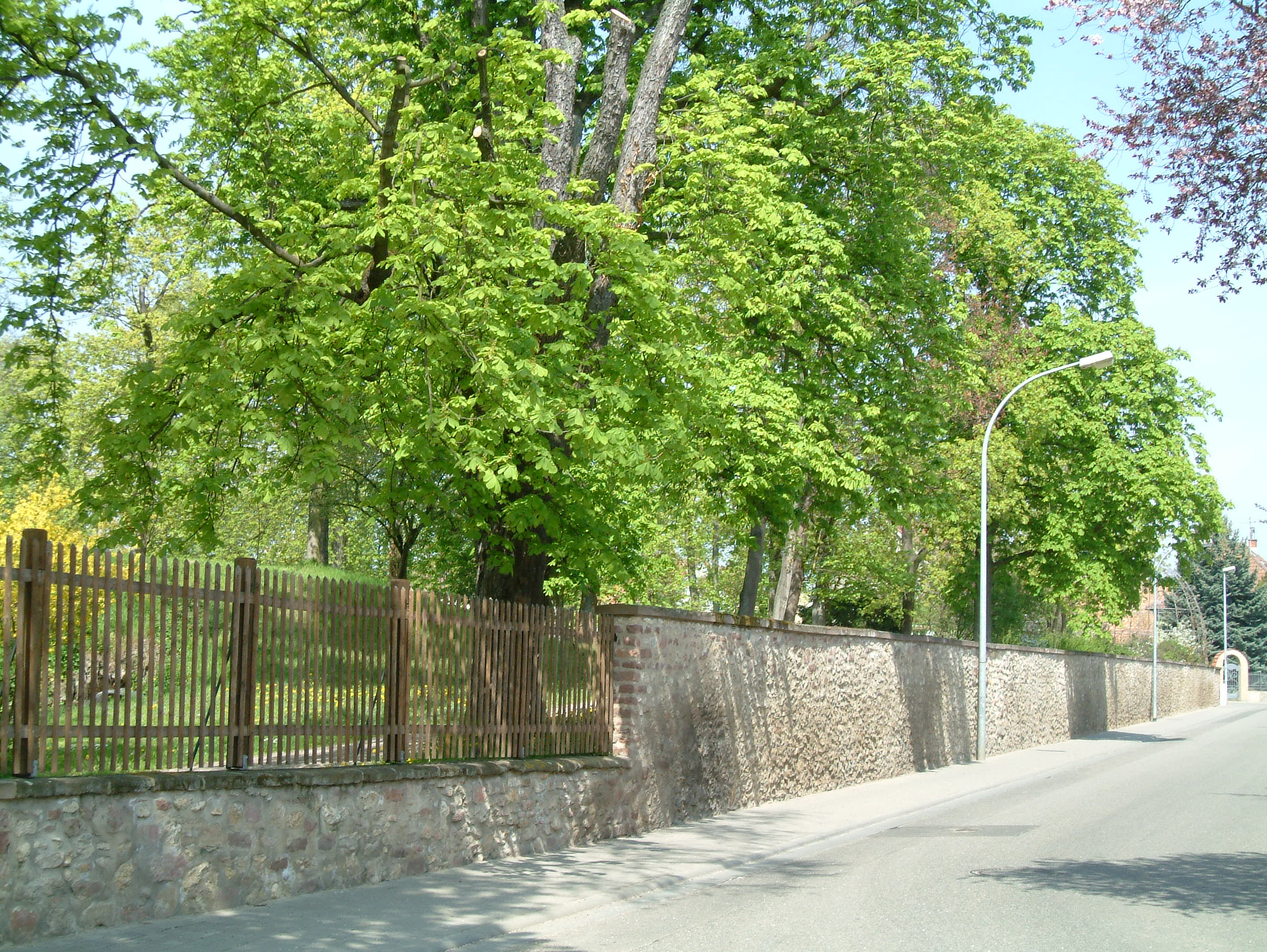 Schlosspark (Ost) zu Dirmstein, selbst fotografiert am 24.04.2006 und freigegeben durch Benutzer:Mundartpoet